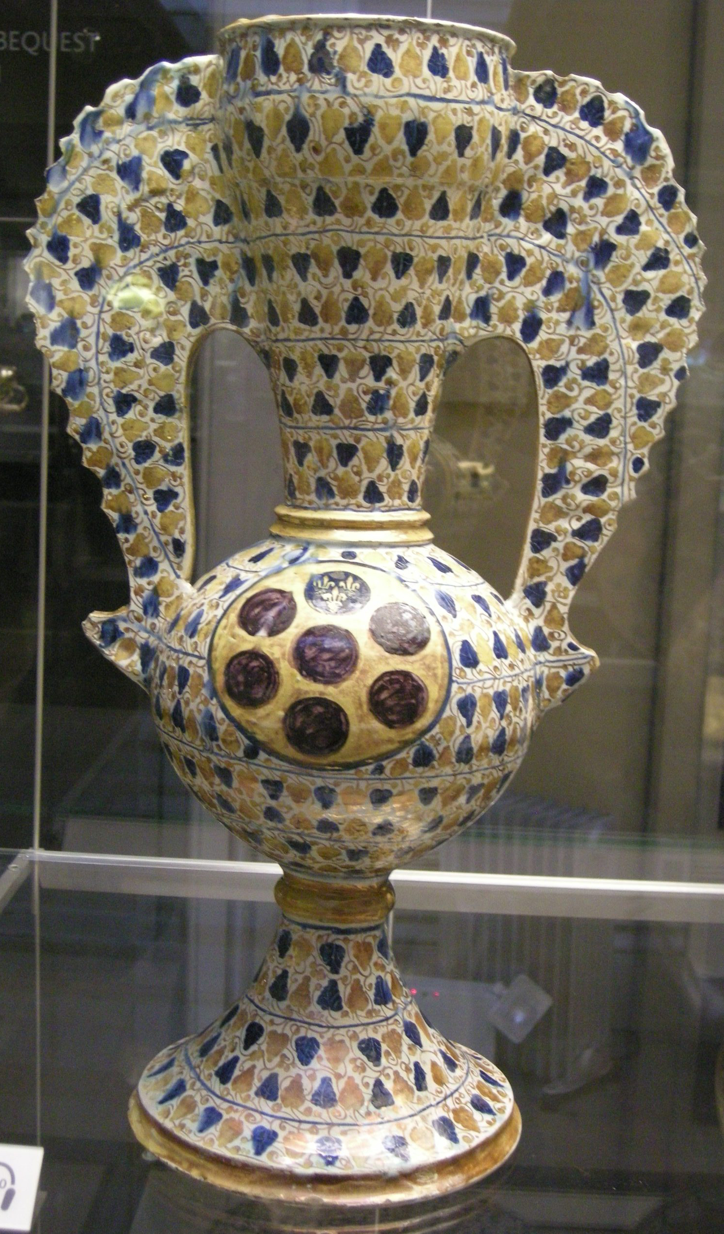 Maiolica di manises, , vaso con manici ad ala e stemmi medici, 1465-92